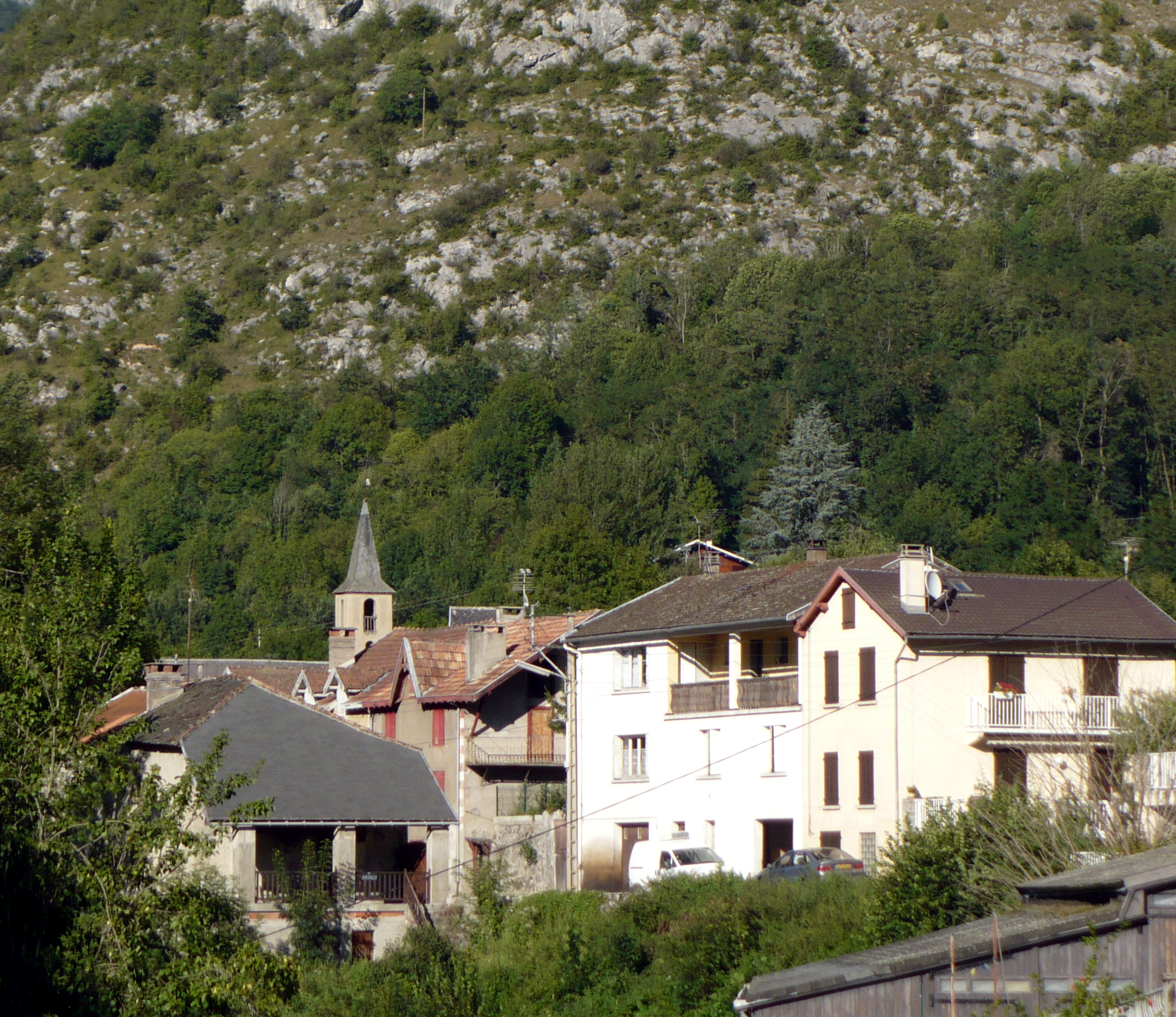 Vue de Capoulet